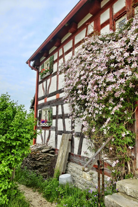 Deutschland - Baden-Württemberg - Landkreis Tuttlingen - Neuhausen ob Eck: Freilichtmuseum - Bärbele-Haus